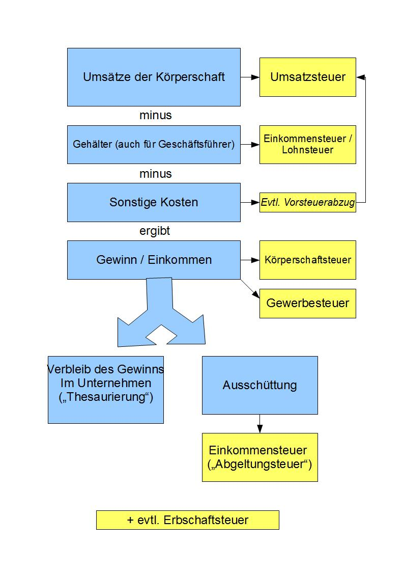 Vereinfachtes Schema zur Verdeutlichung des Zusammenhangs der verschiedenen Steuerarten bei Körperschaften This diagram image could be recreated using vector graphics as an SVG file. This has several advantages; see Commons:Media for cleanup for more information. If an SVG form of this image is available, please upload it and afterwards replace this template with vector version available|new image name . This image was uploaded in the JPEG format even though it consists of non-photographic data. This information could be stored more efficiently or accurately in the PNG format or SVG format. If possible, please upload a PNG or SVG version of this image without compression artifacts, derived from a non-JPEG source (or with existing artifacts removed). After doing so, please tag the JPEG version with Superseded|NewImage.ext and remove this tag. This tag should not be applied to photographs or scans. For more information, see BadJPEG .